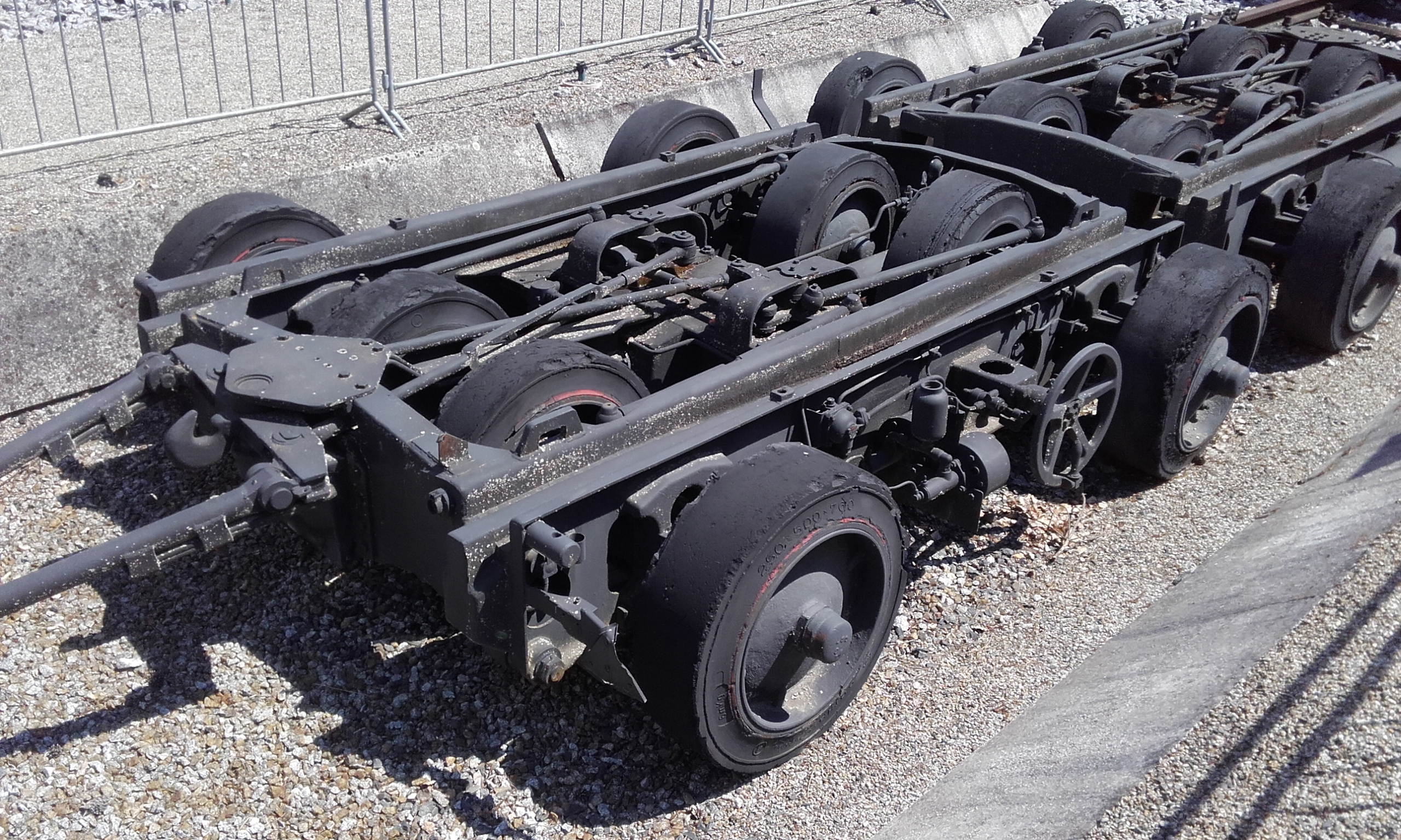 Silniční podvalník pro přepravu železničních vozů ve vojenském muzeu v Lešanech.